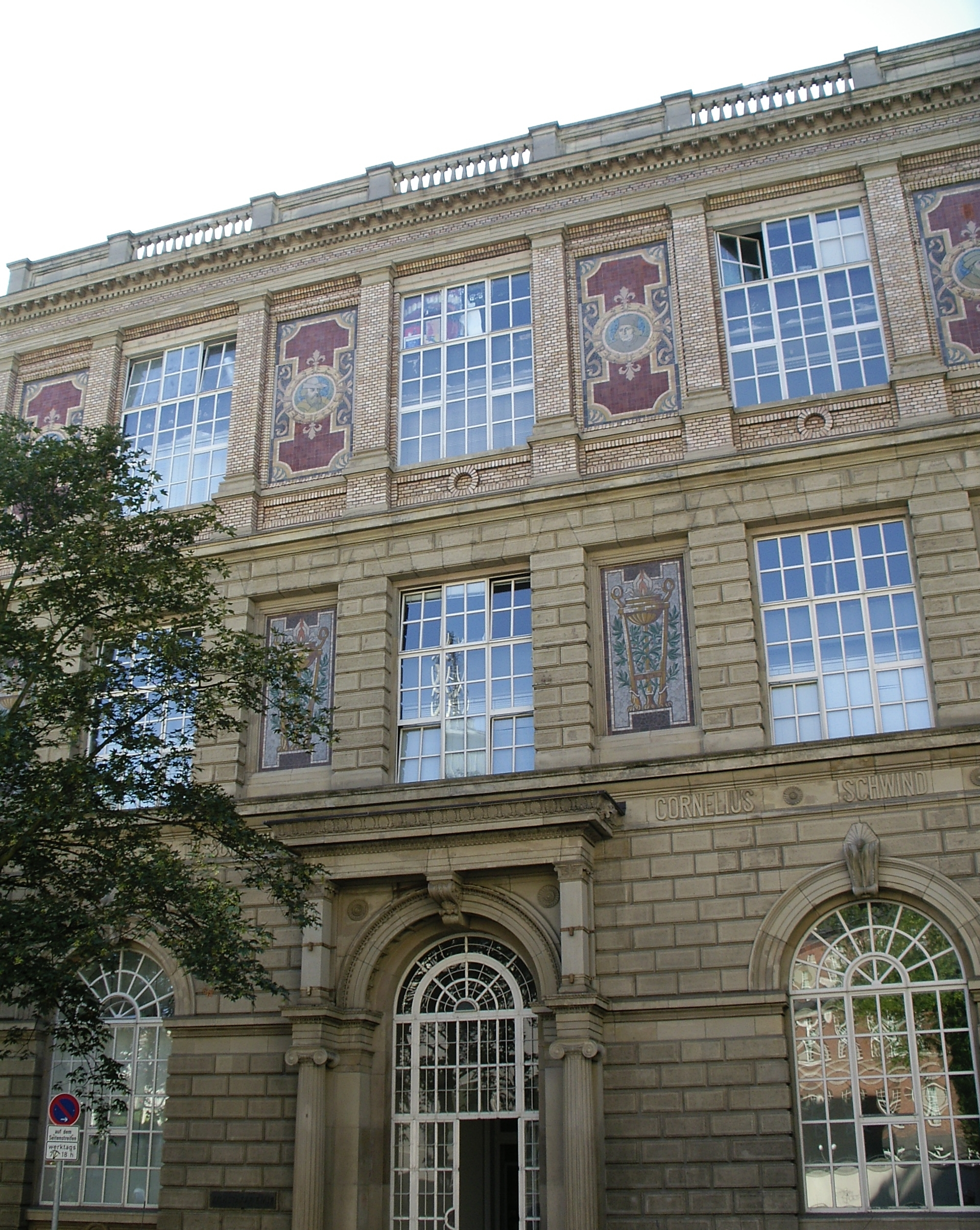 Düsseldorf Kunstakademie - Eingang